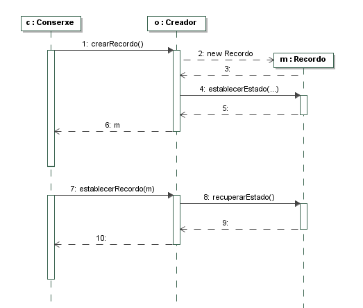 Diagrama de Secuencia que explica as colaboracións existentes no patrón Memento